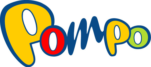 Logo společnosti Pompo